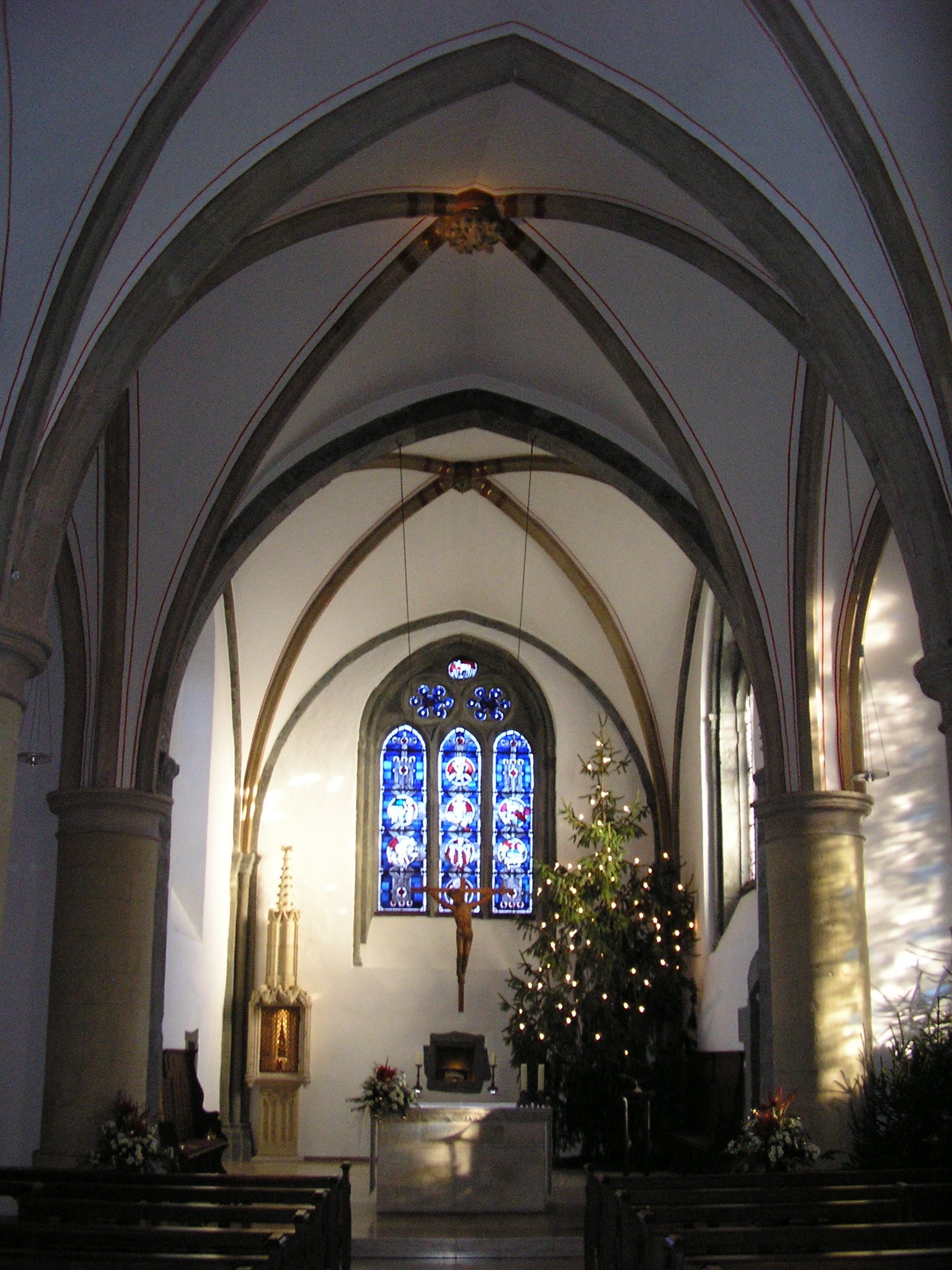 Stromberg St. Lambertus